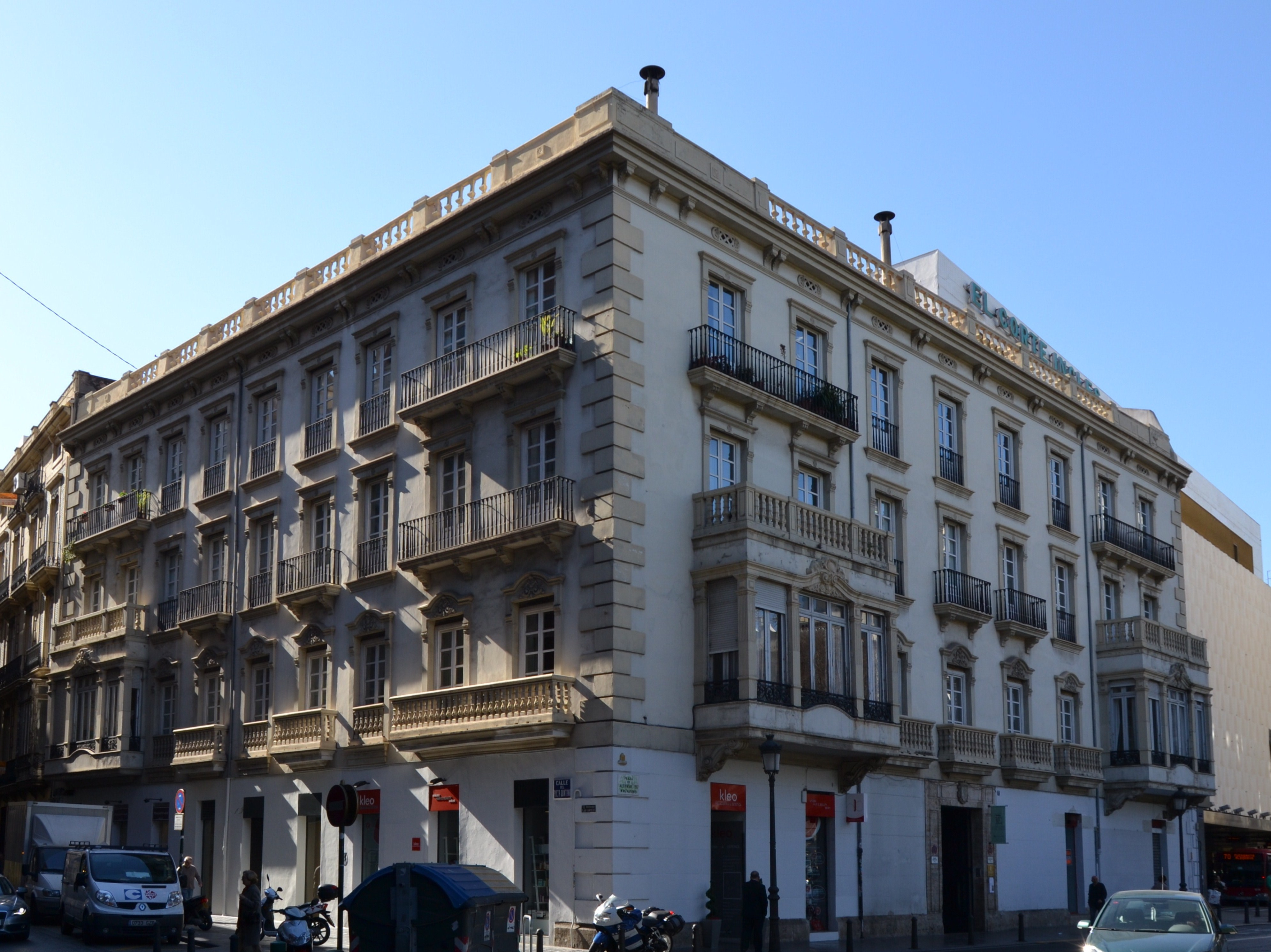 València, palau del vescomte de Valdesoto.